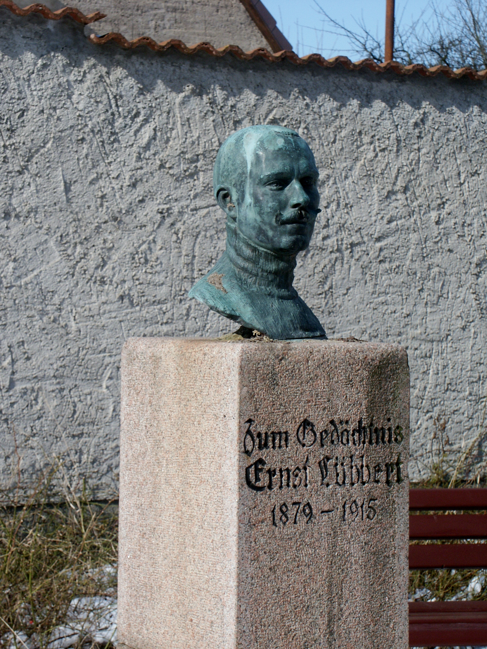 Denkmal für Ernst Lübbert in Warin, 1917 von Bildhauer Wilhelm Wandschneider